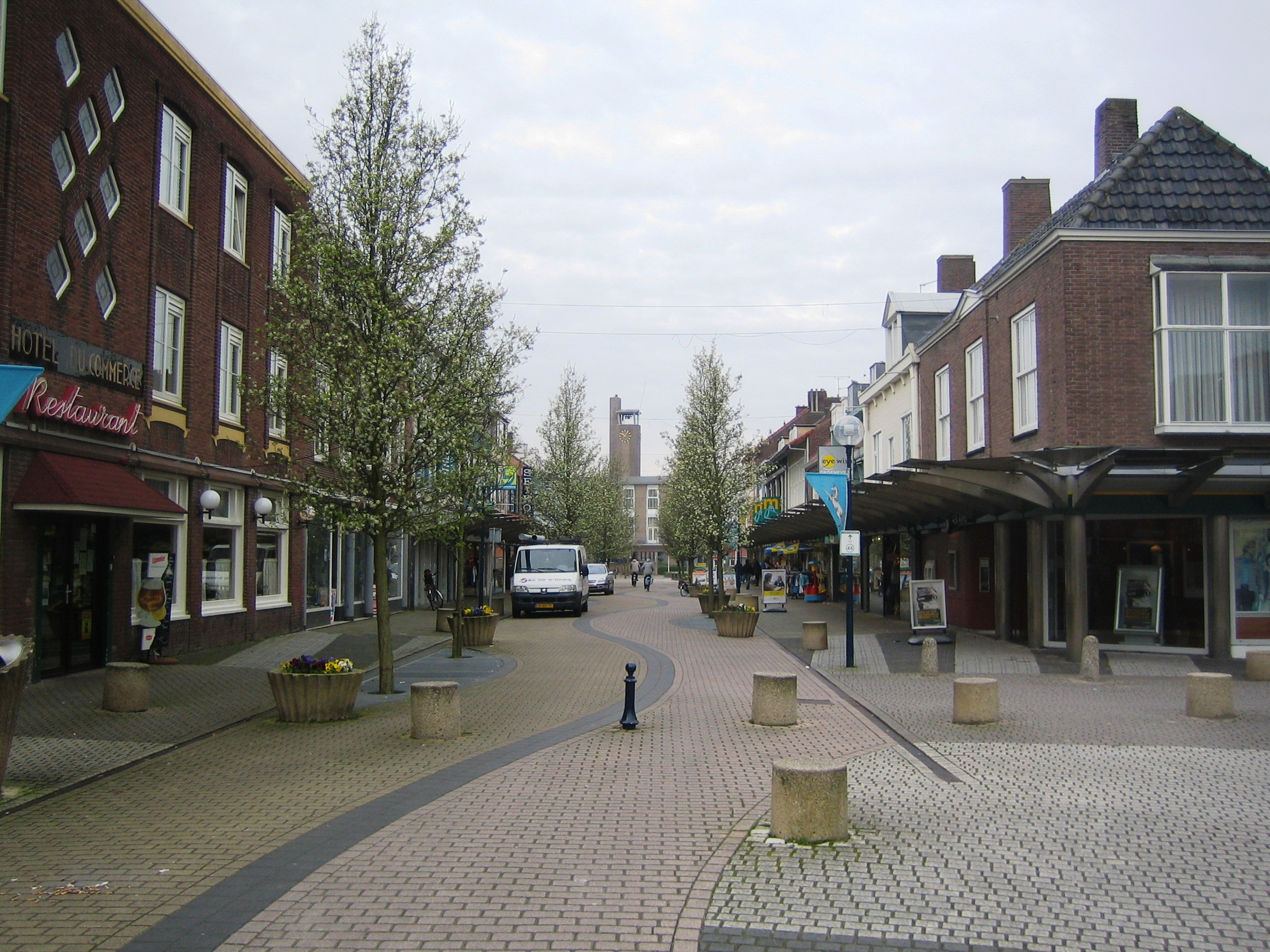 Oostburg main street